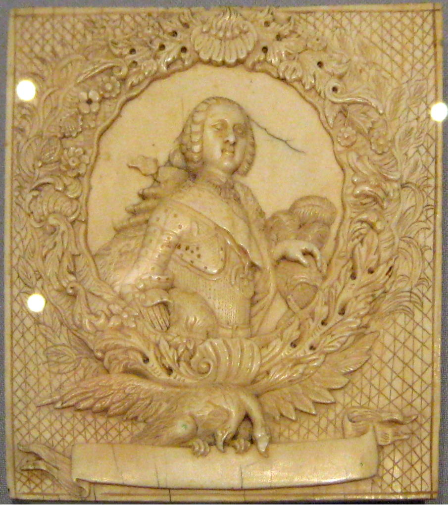 Неизвестный севернорусский резчик. Плакетка с портретом великого князя Петра Федоровича. СПб (?), сер. 19 века. Мамонтовый бивень, рельефная резьба, гравировка, сверление.